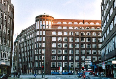 Das Gebäude der Finanzbehörde an der Einmündung des Valentinskamps auf den Gänsemarkt in Hamburg-Neustadt, 1918 bis 1926 von Fritz Schumacher erbaut. Blickrichtung: von Norden aus der Dammtorstraße. Rechts ist im Anschnitt das Deutschlandhaus zu sehen. This is a photograph of an architectural monument.